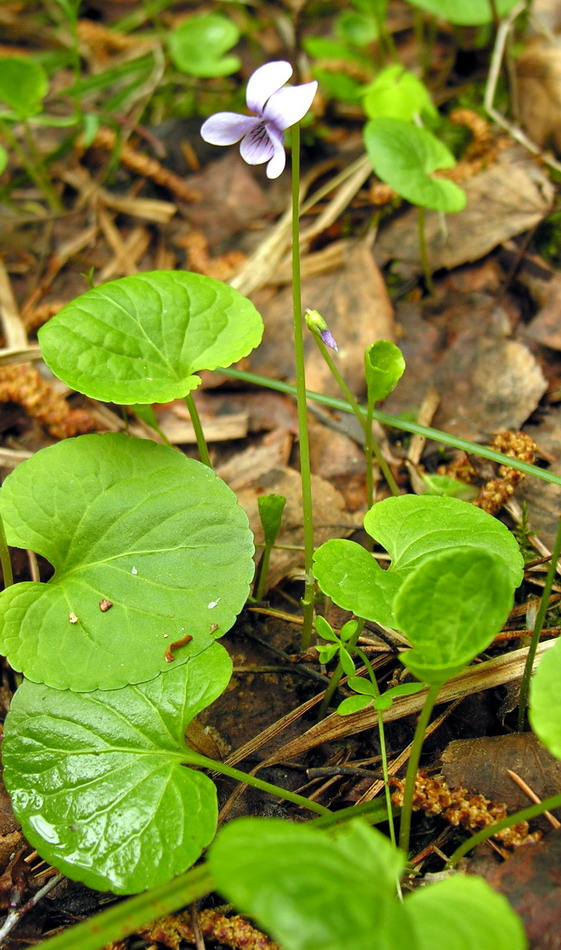 Durpyninė našlaitė (Viola palustris) Šeima. Našlaitiniai (Violaceae) Foto: Algirdas, 2006 m. gegužės 20 d., Lietuva